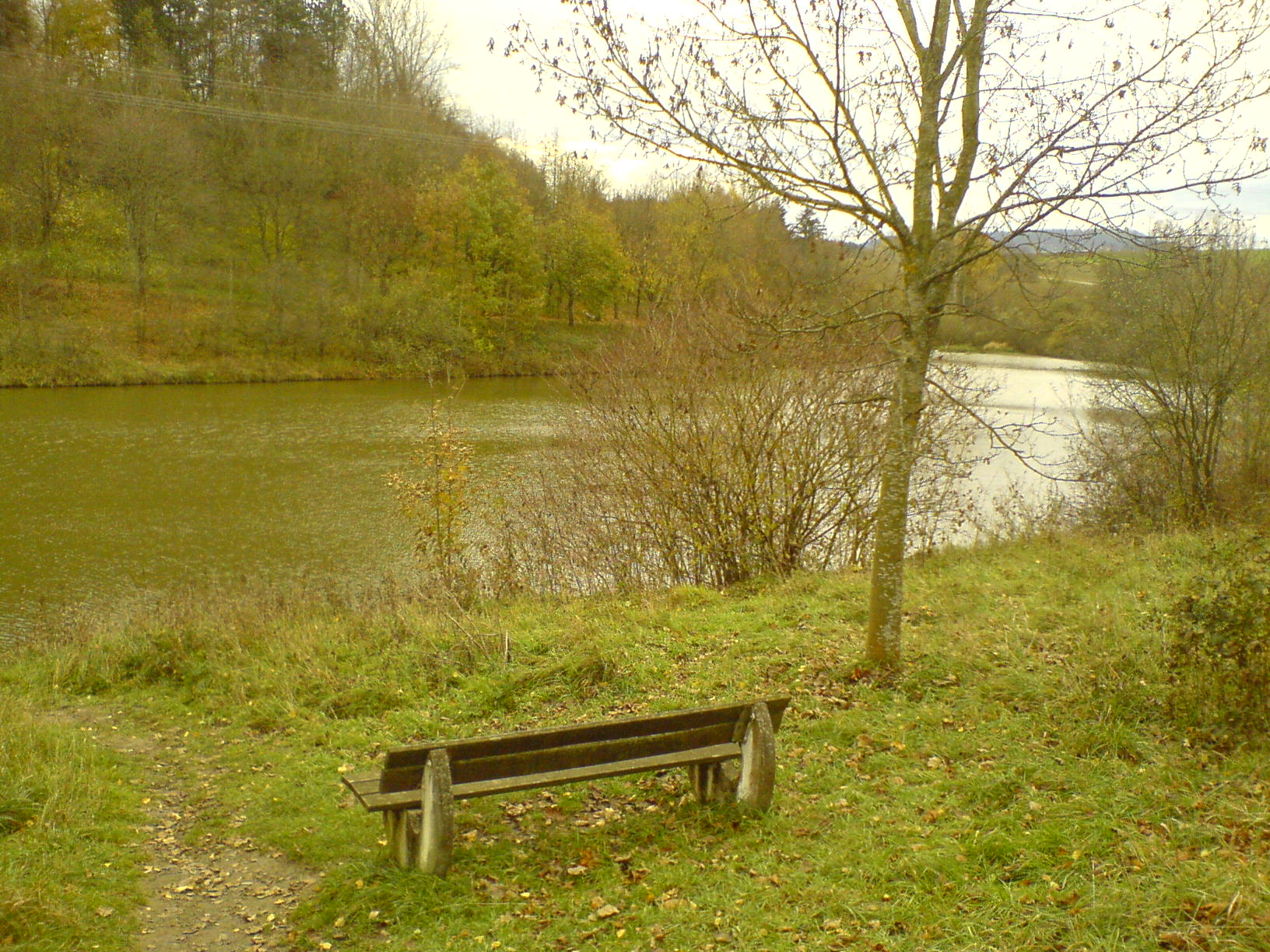 Beschreibung: Gaugersee im Naherholungsgebiet zwischen Trossingen und Schura. Quelle: selbst erstellt Fotograf: Christian Meyer-Oldenburg Datum: 12.11.2006